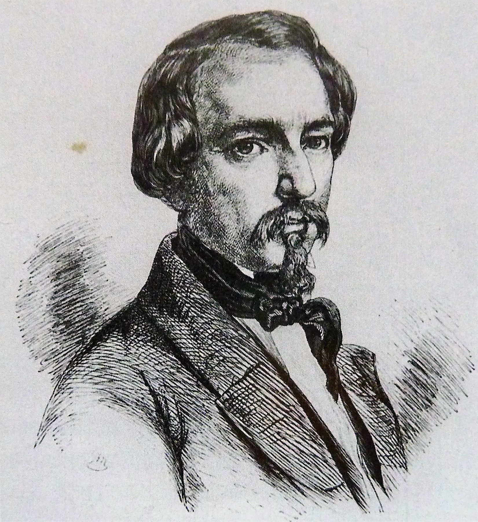 Kunstmaler Samuel Friedrich Diez (1803–1873)